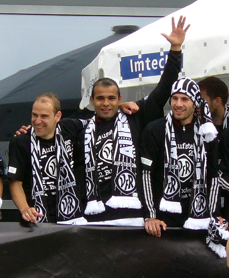 Robert Lechleiter, Cidimar Rodrigues da Silva und Enrico Valentini bei der Aufstiegsfeier des VfR Aalen am 5. Mai 2012